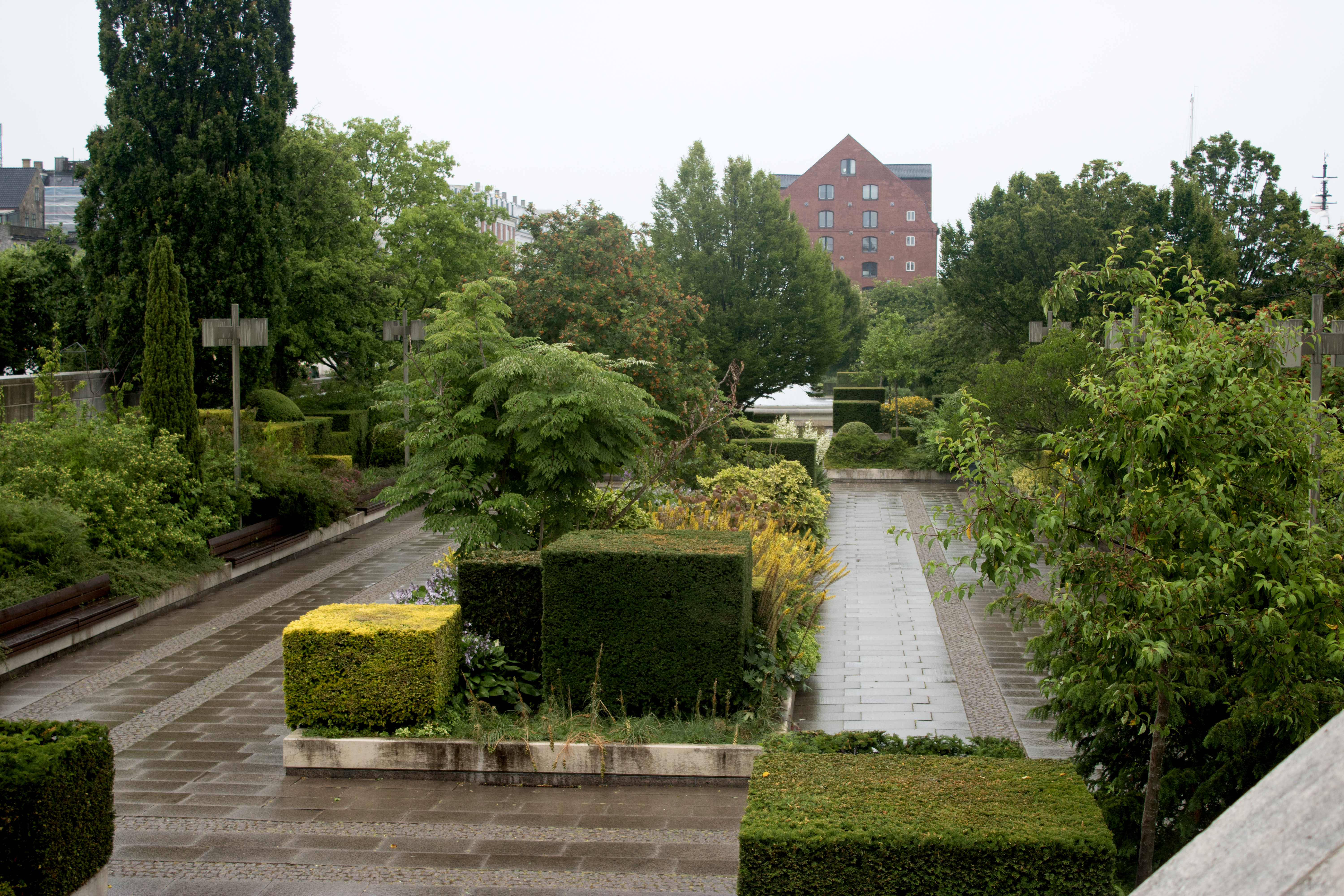 Amaliehaven in Copenhagen, Denmark